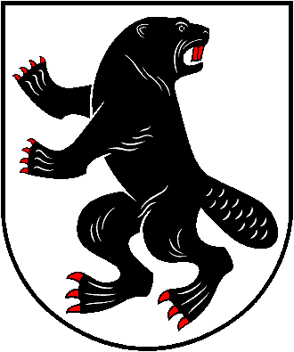 Užusalių herbas